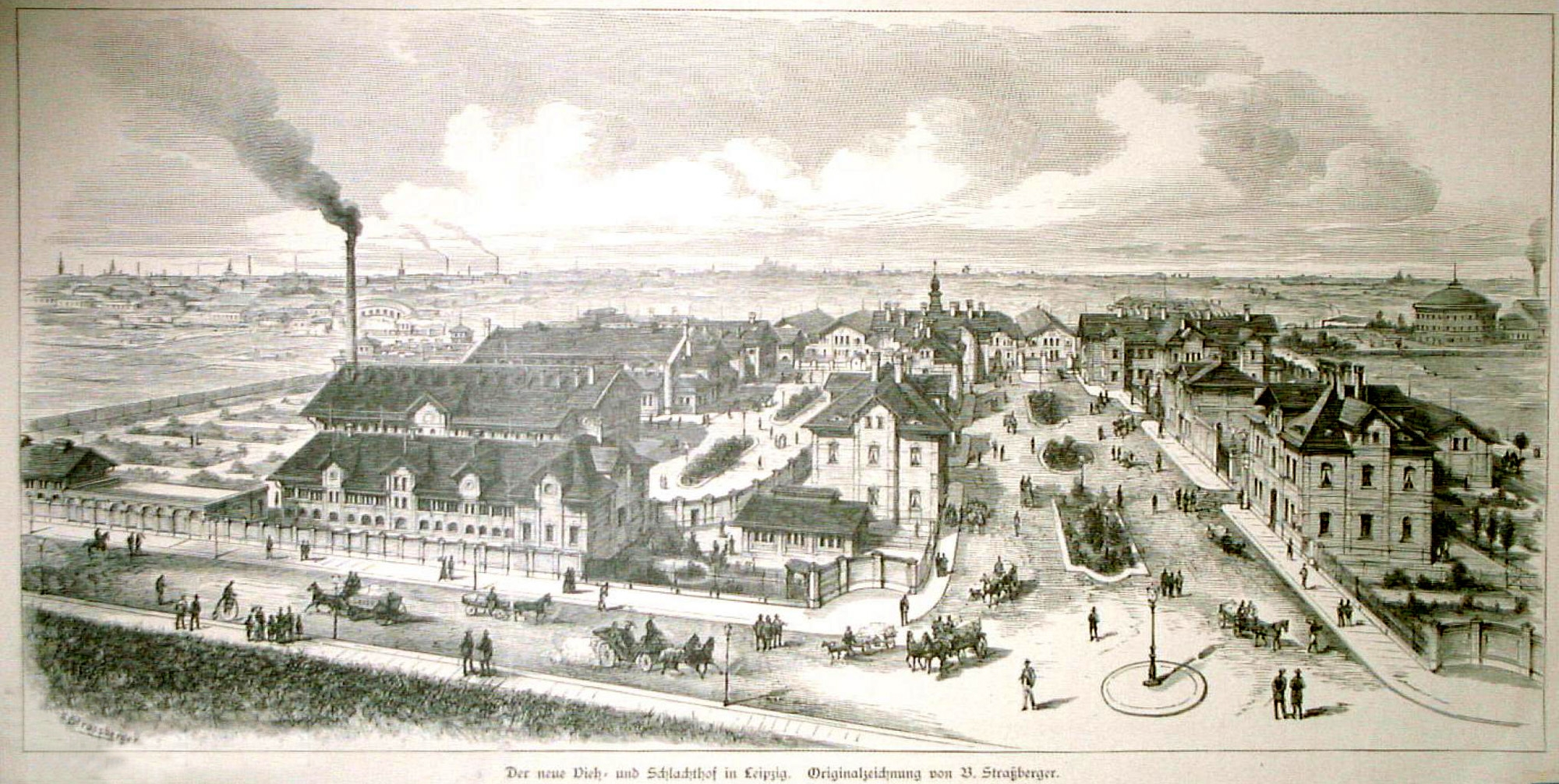 Die Gesamtansicht des Schlachthofs in Leipzig um 1890